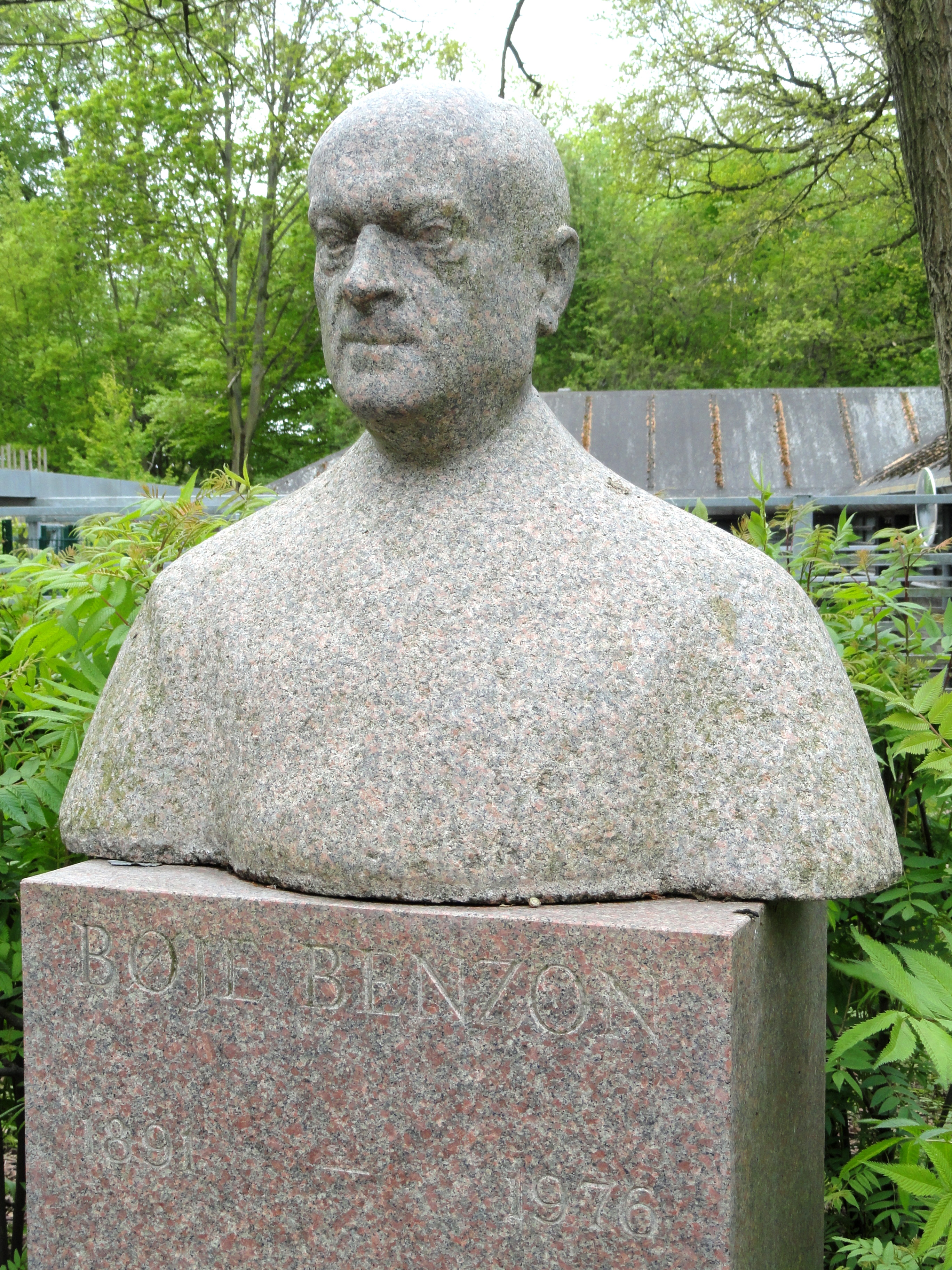 Copenhagen Zoo, Frederiksberg, Copenhagen, Denmark.